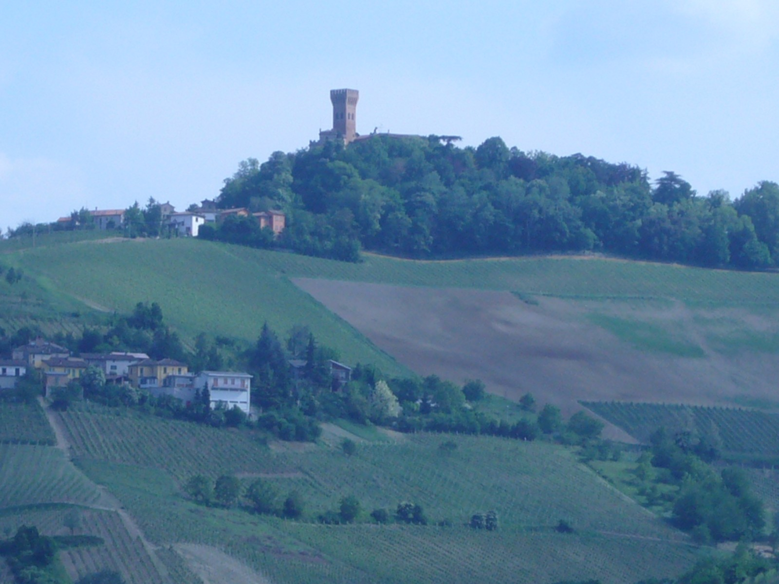 Castello di Cigognola, Pavia, Italia